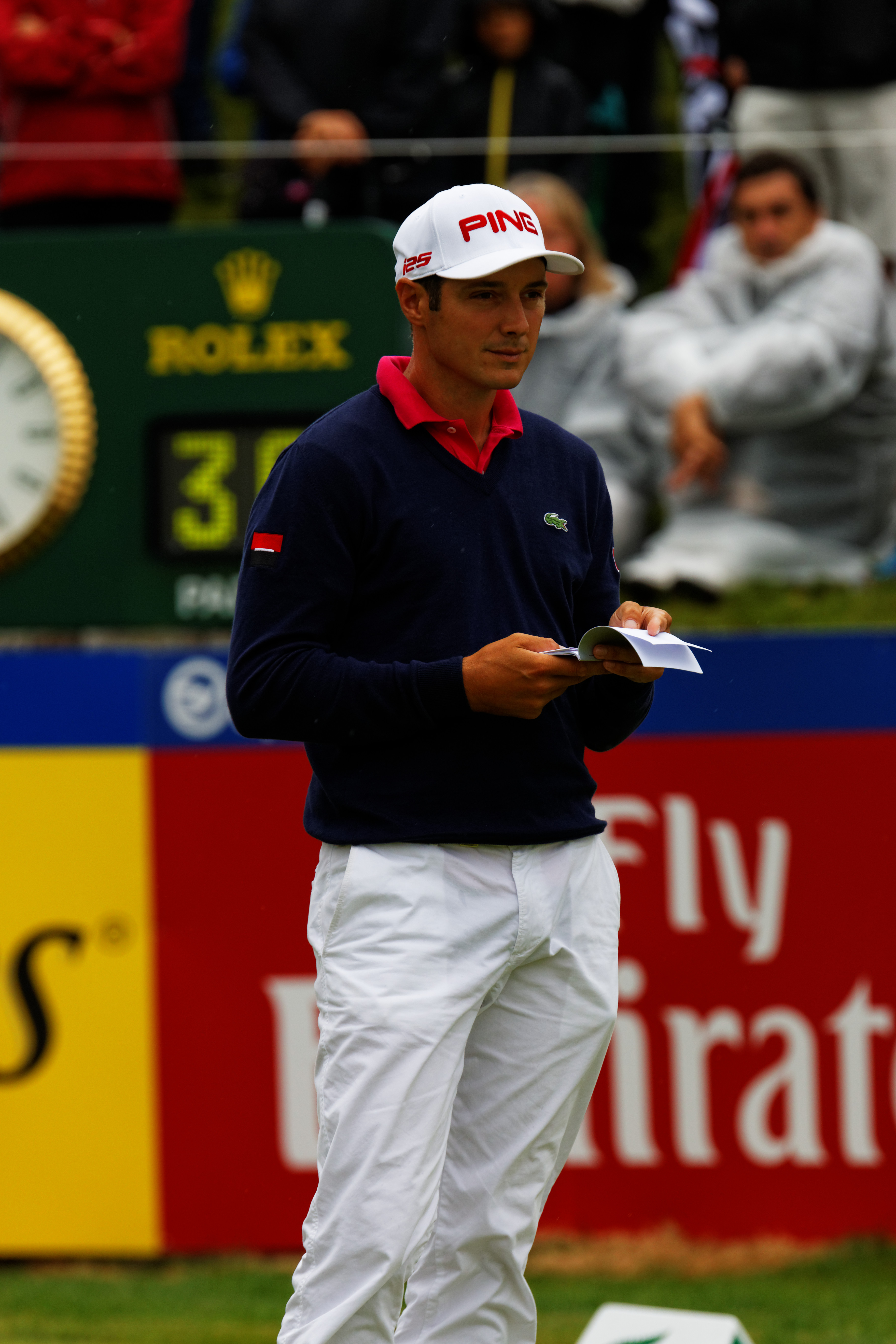 Julien Quesne lors du quatrième tour de l'Open de France 2014 - Golf National - Saint-Quentin-en-Yvelines (78) - départ du trou n° 1